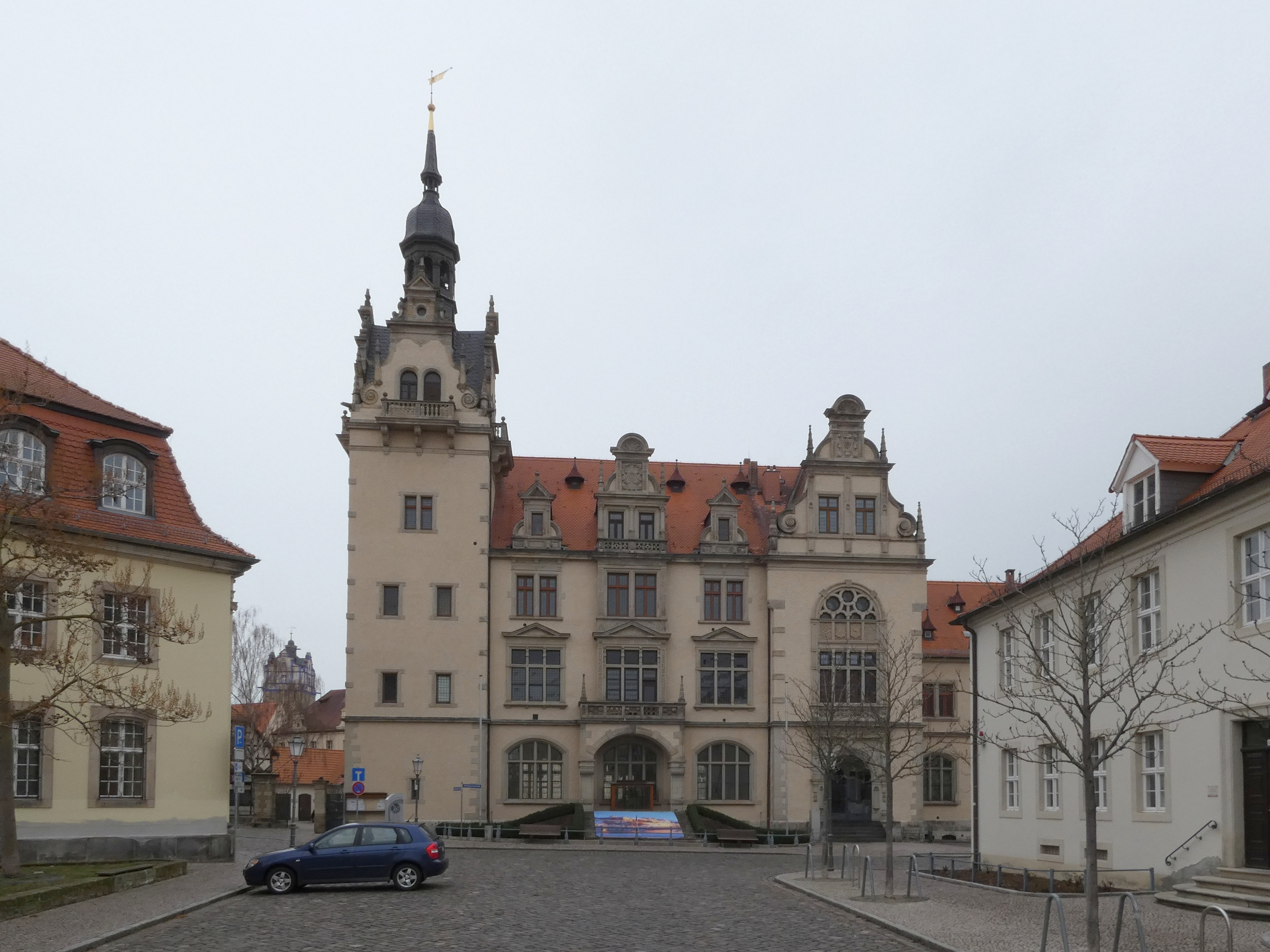 Rathaus Bernburg März 2019